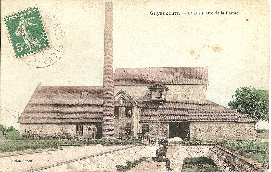 Carte Postale de 1910